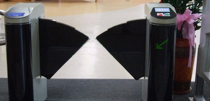 中文（台灣）: 北台灣科技學院圖書館入口自動閘門。